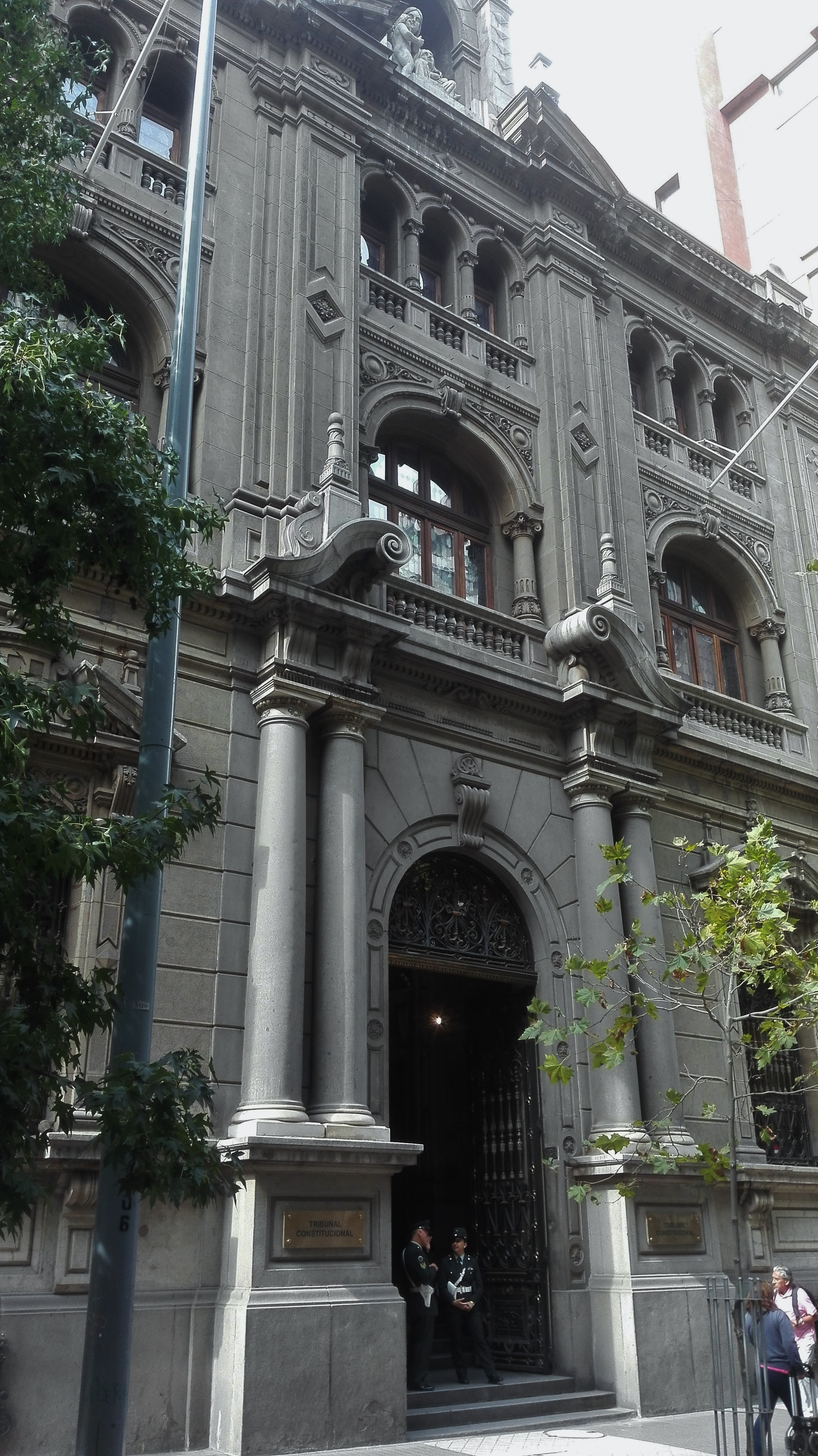 Edificio del Tribunal Constitucional Chile, Paseo Huérfanos, Santiago.